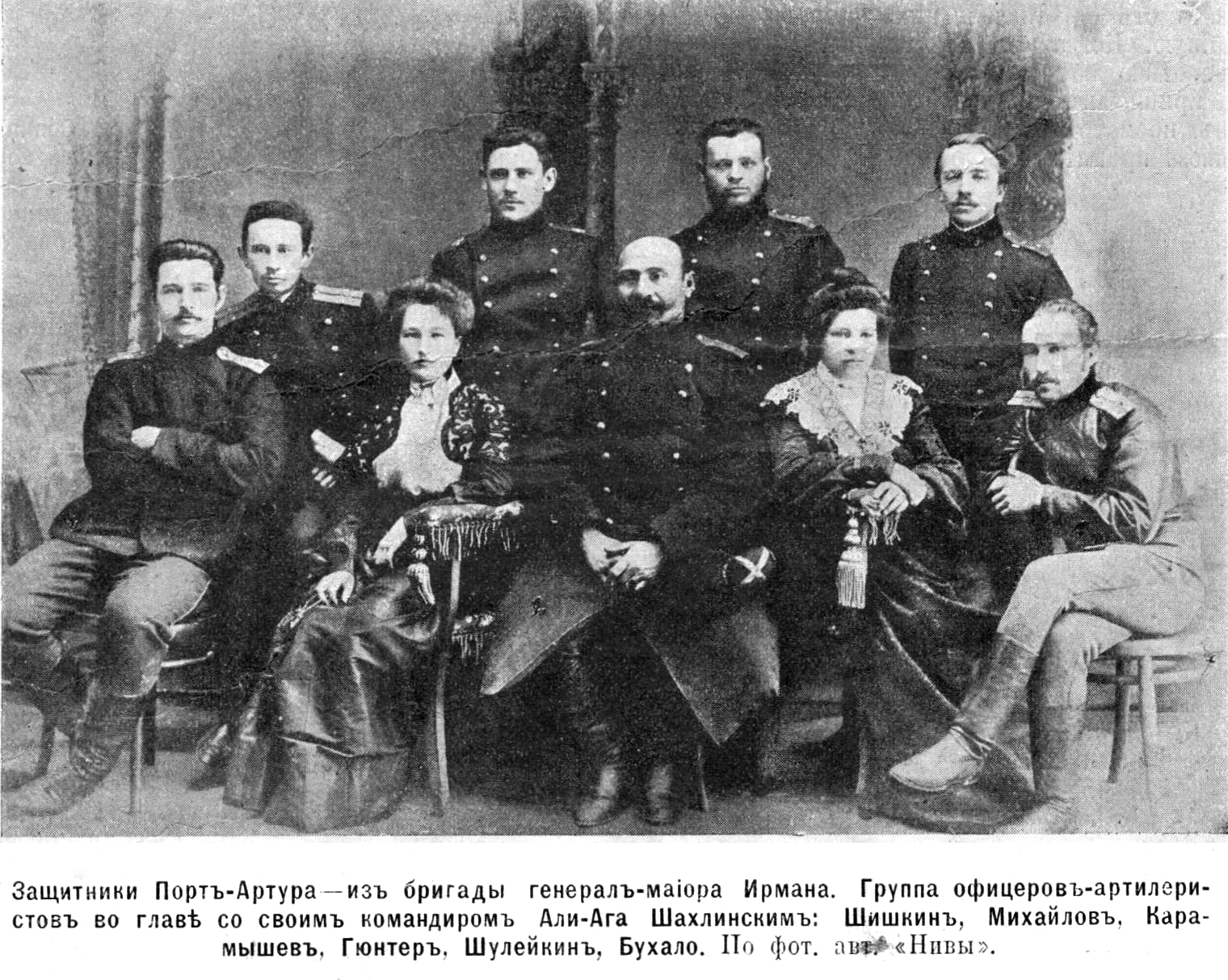 Защитники Порт-Артура - из бригады генерал-майора Ирмана. Группа офицеров-артиллеристов во главе со своим командиром Али-Ага Шихлинским.